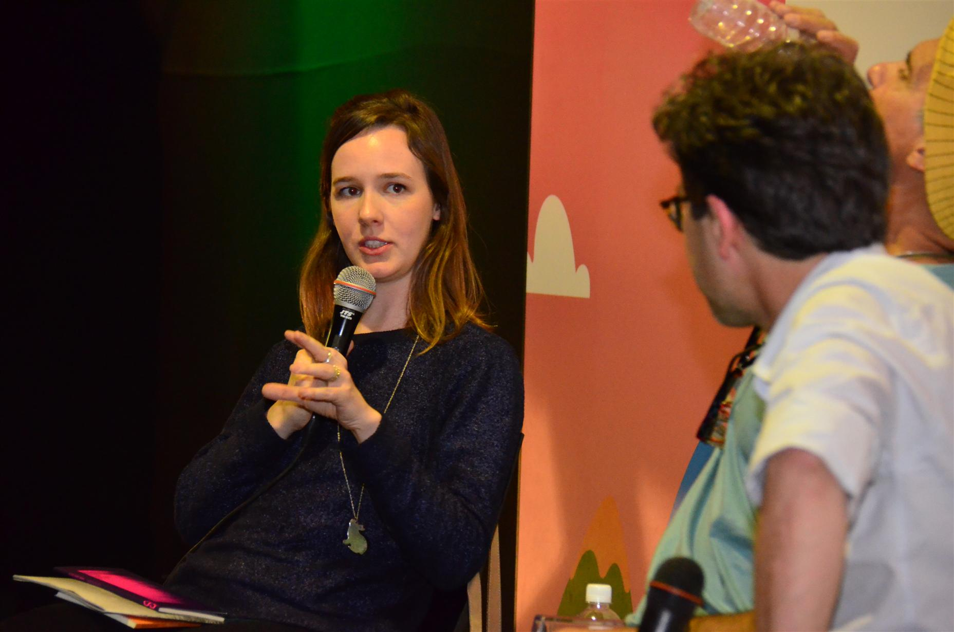 Foto: André Luiz D. Takahashi